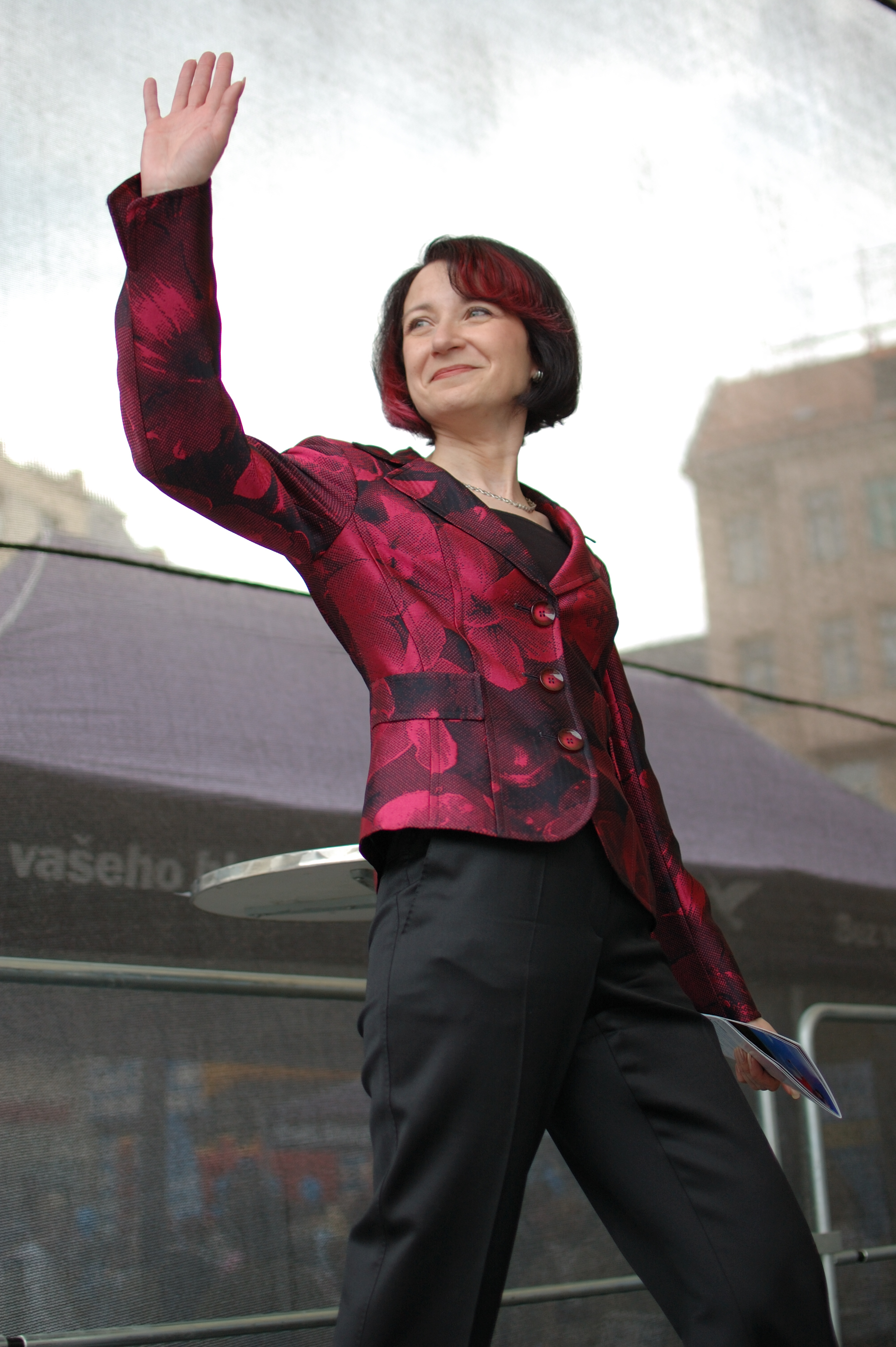 Dana Filipi